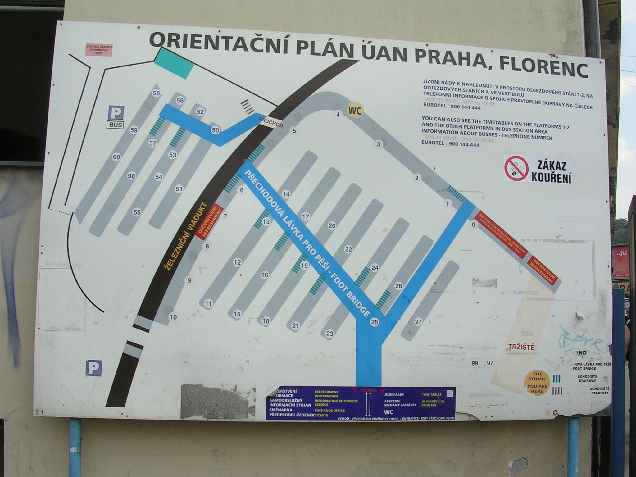 Schéma autobusového nádraží “Praha, ÚAN Florenc” umístěné u vchodu od tržnice